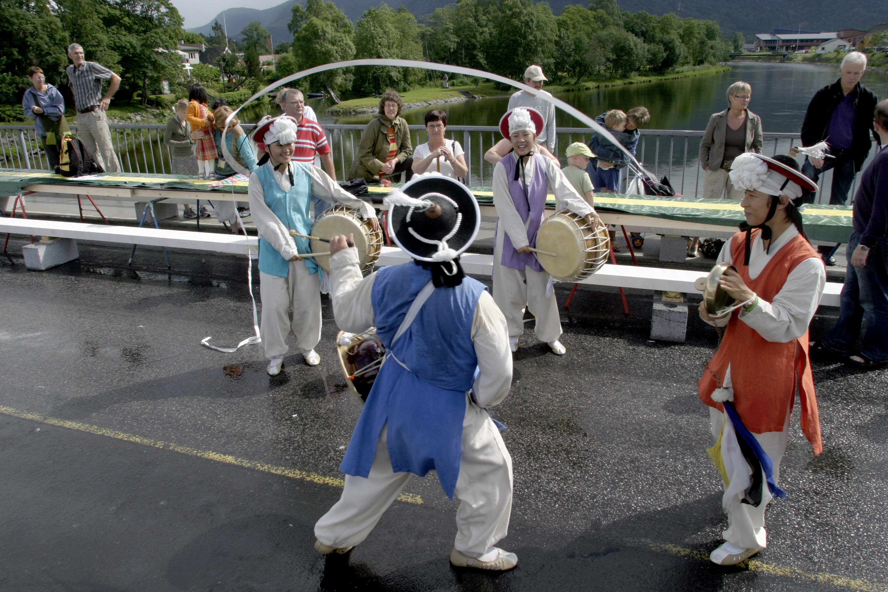 Opptog gjennom Førde under Førdefestivalen.